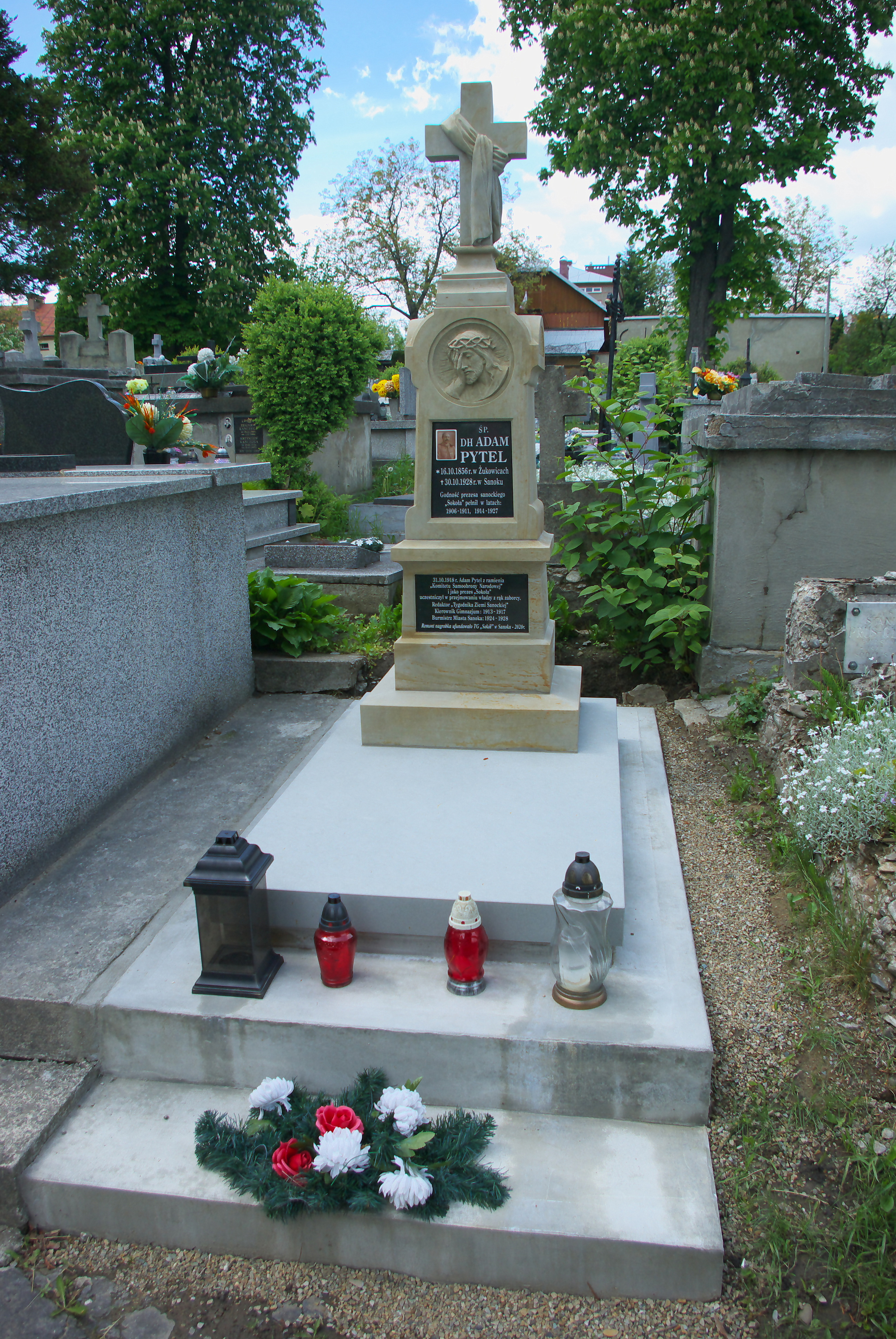 Odnowiony nagrobek Adama Pytla na Cmentarzu Centralnym w Sanoku (2020).